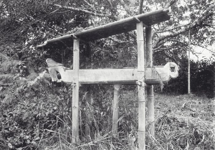 Foto. Graf in de Gajolanden, Atjeh